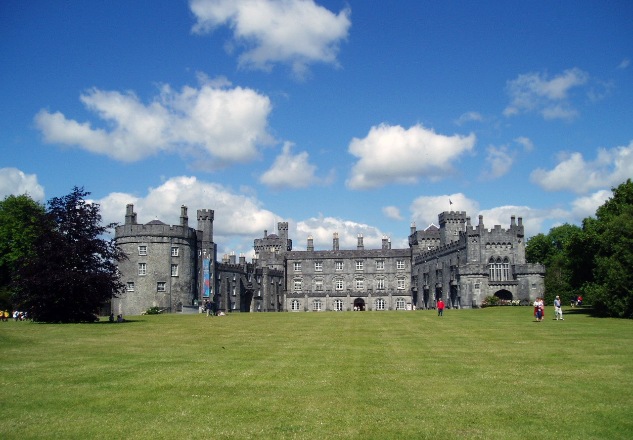 Kilkenny Castle, Ireland